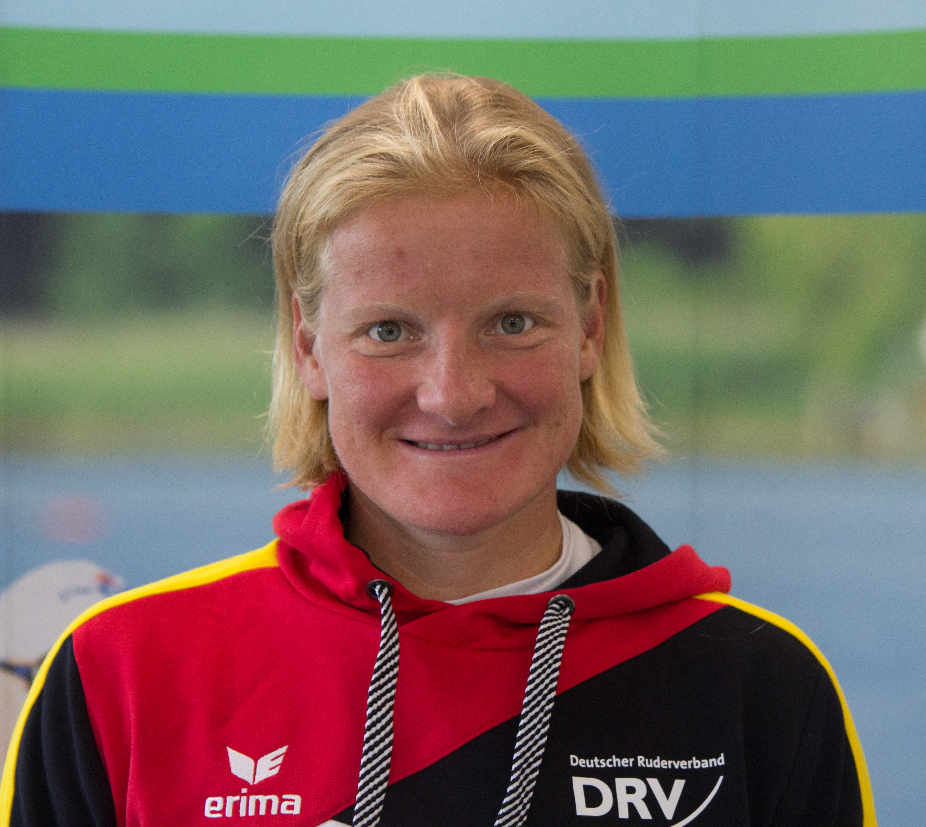 Medientag des Ruderverbandes in der Ruderakademie Ratzeburg am 6. September 2017: Annekatrin Thiele